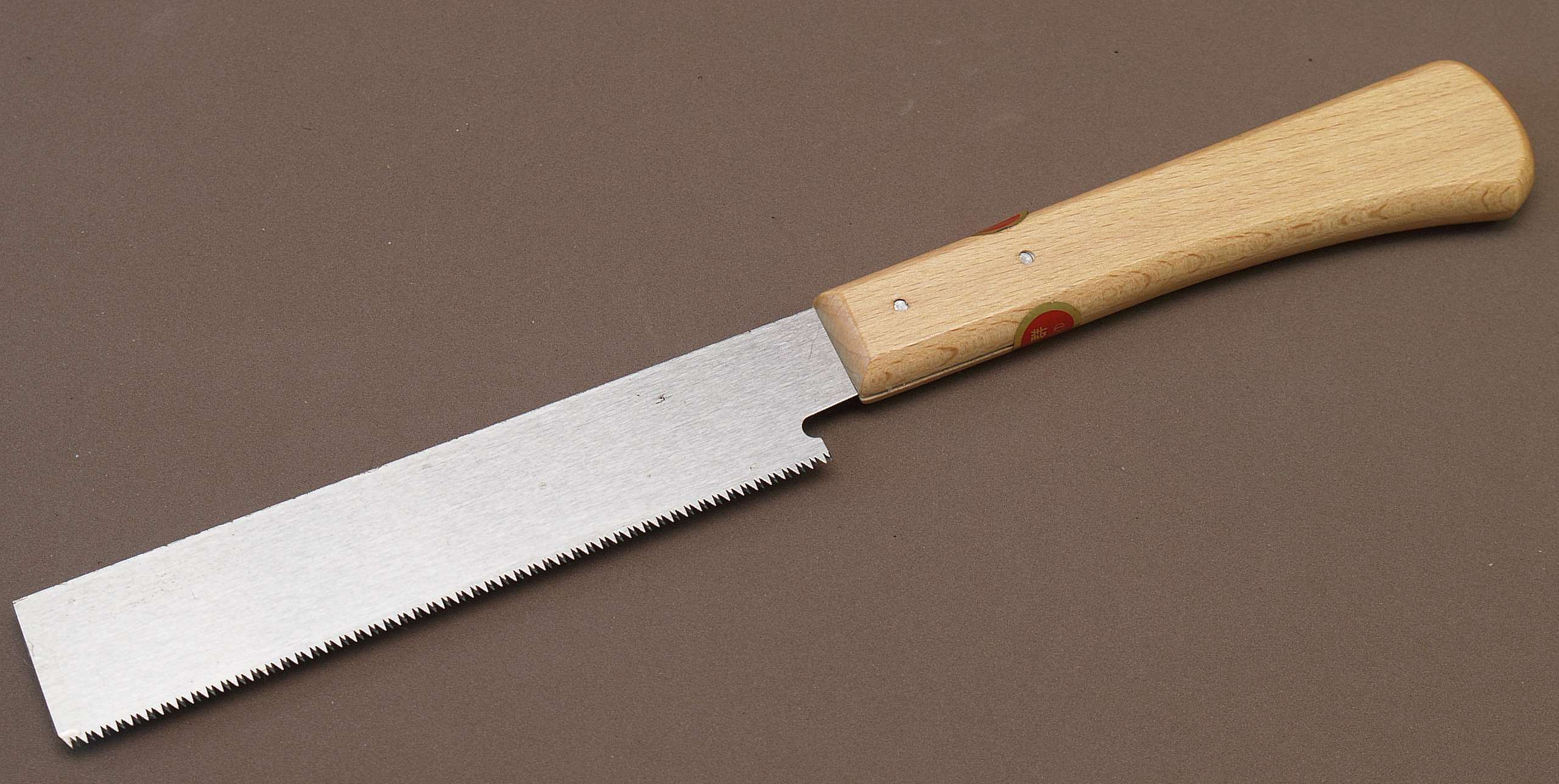 Kugihiki, Japanese saw, Dübelsäge